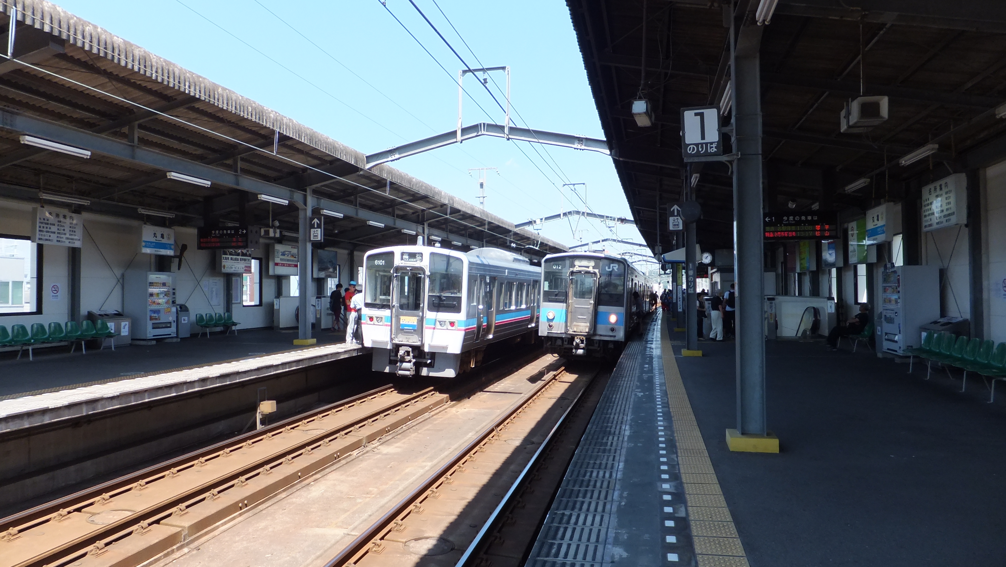 香川県丸亀市 丸亀駅 2015年8月